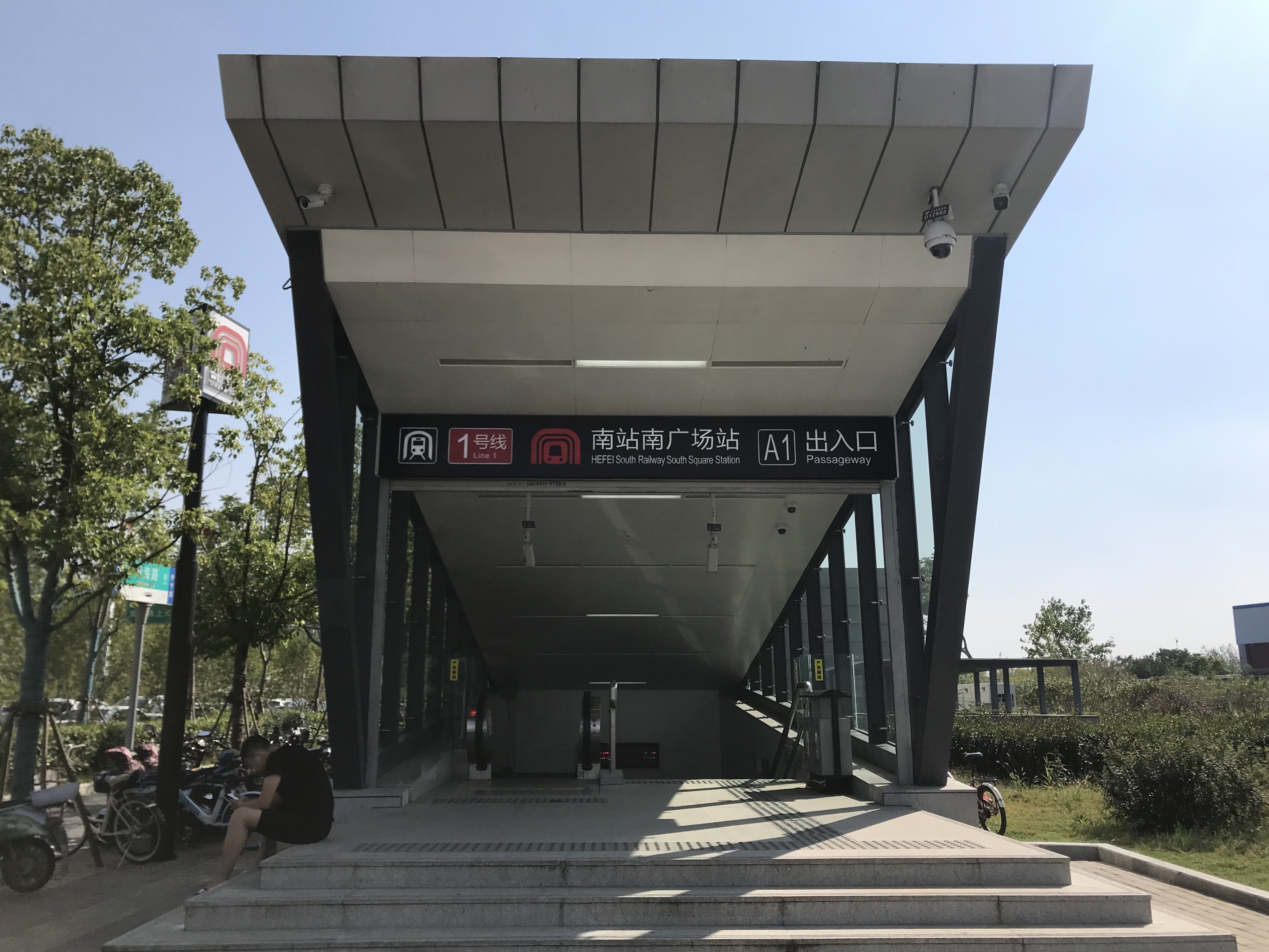 南駅南広場駅のA1番出入り口